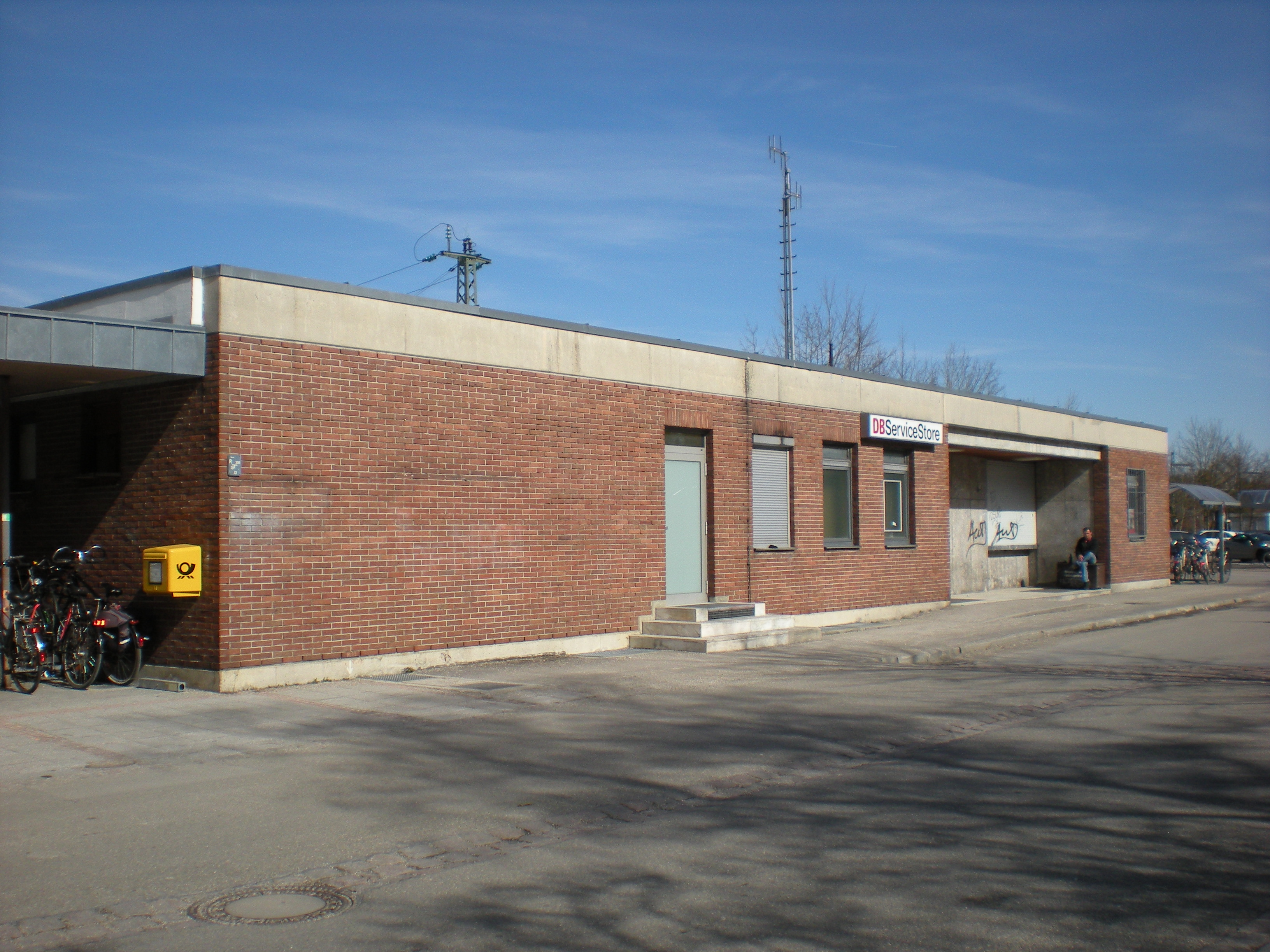 Empfangsgebäude des Münchner S-Bahnhofs Puchheim von der Straßenseite